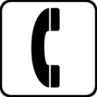 中文（中国大陆）: AIGA符号中电话的象形符号（公共领域）